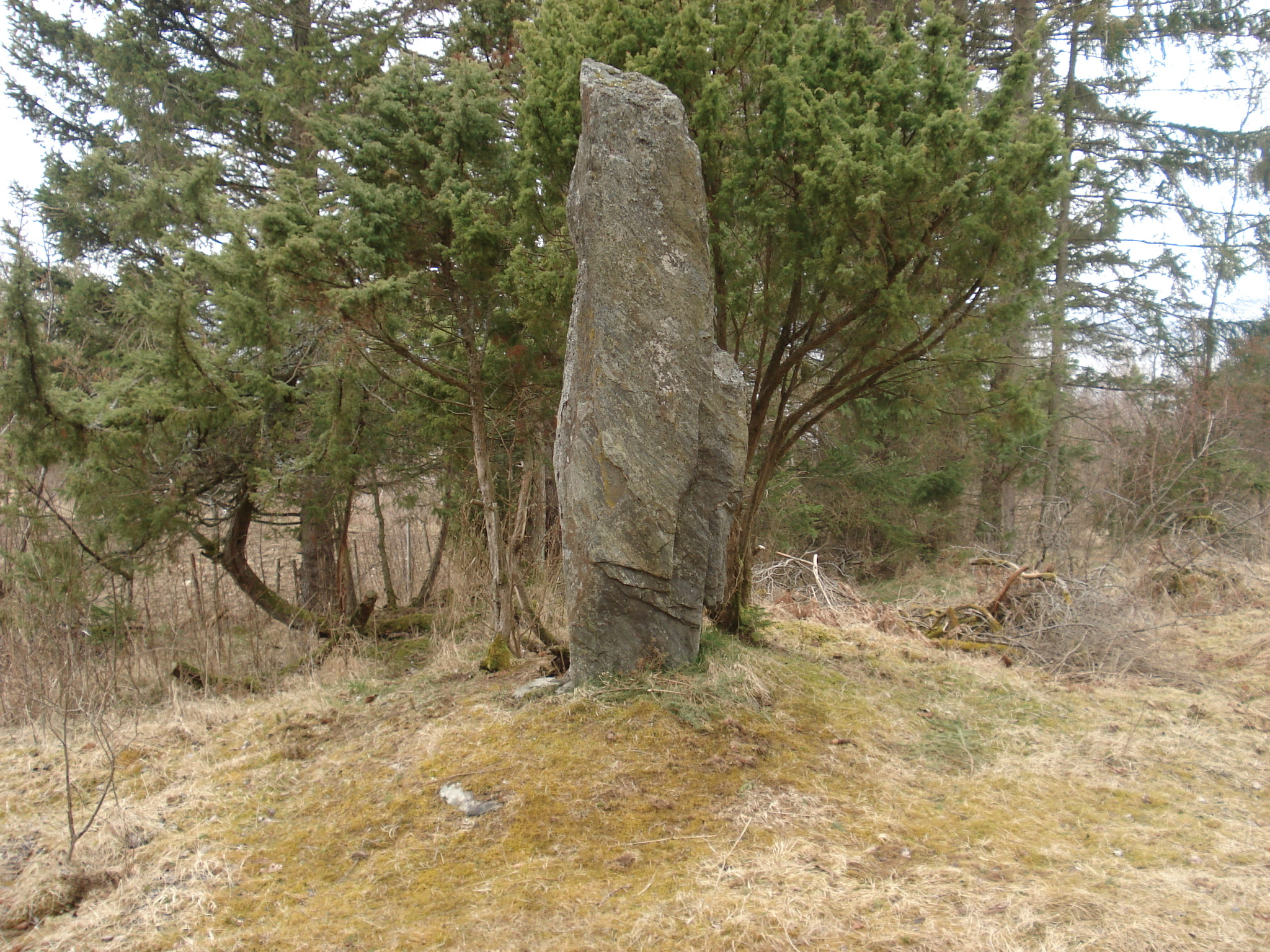 Bauta reist i 1908 på ein gravhaug i område der Olav Vigdeild levde.